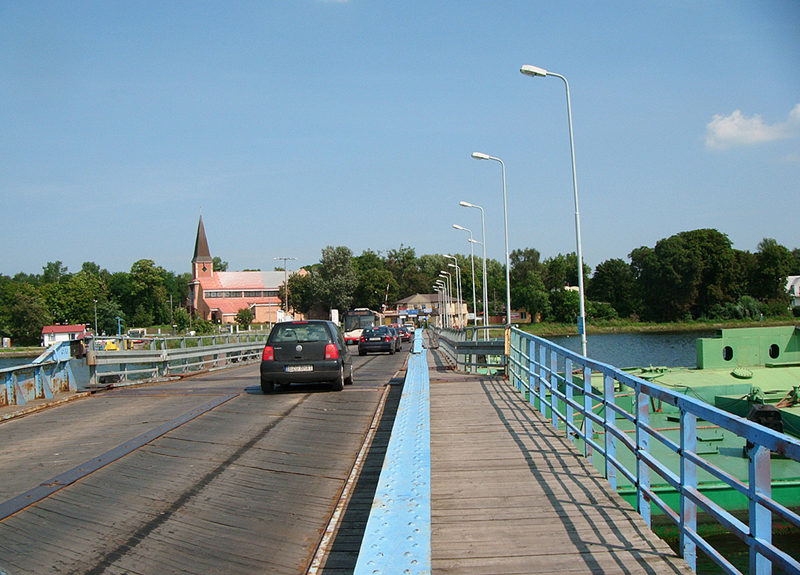 Most pontonowy prowadzący na Wyspę Sobieszewską